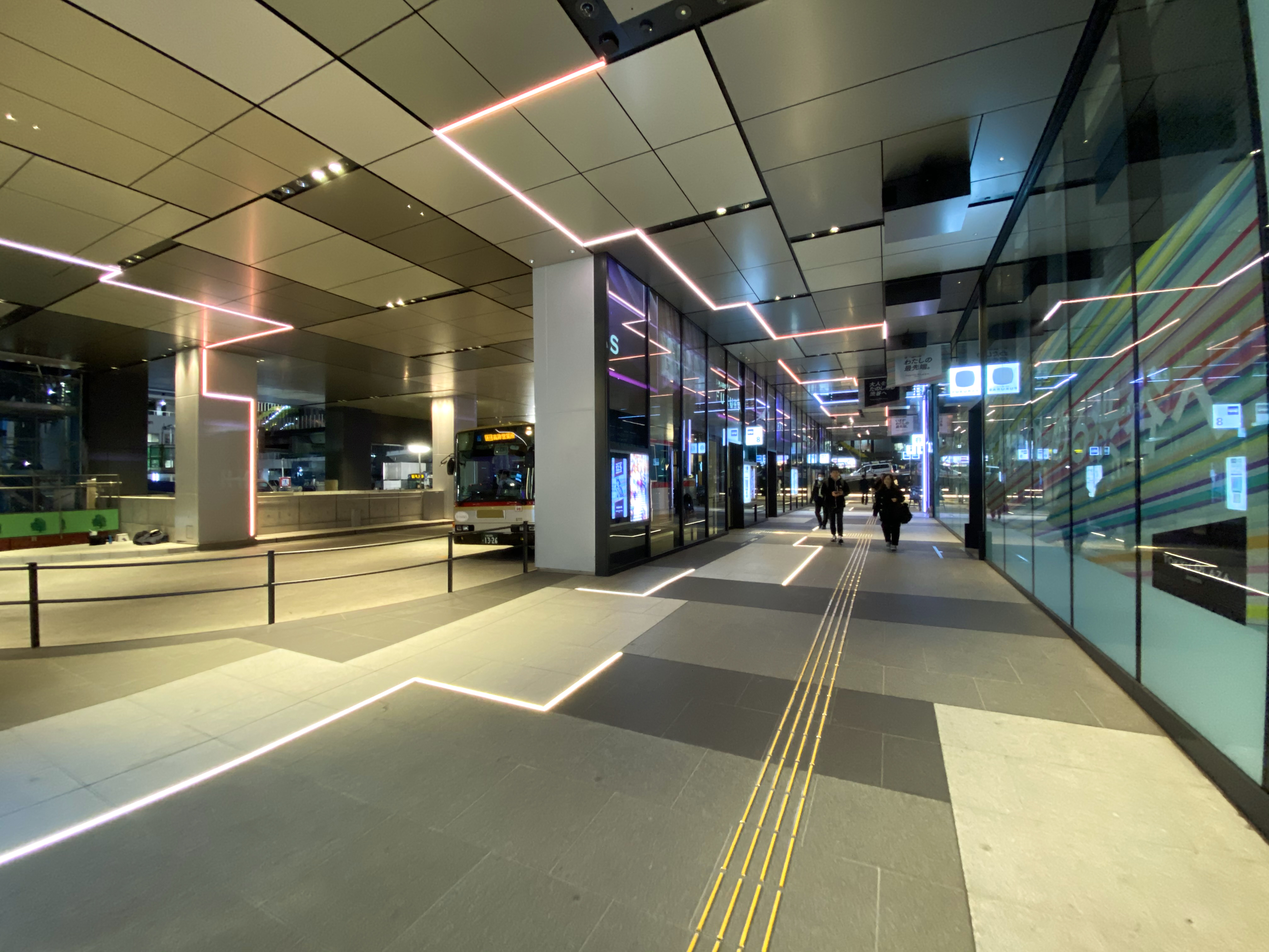 Fukuras Level 1 Bus stop